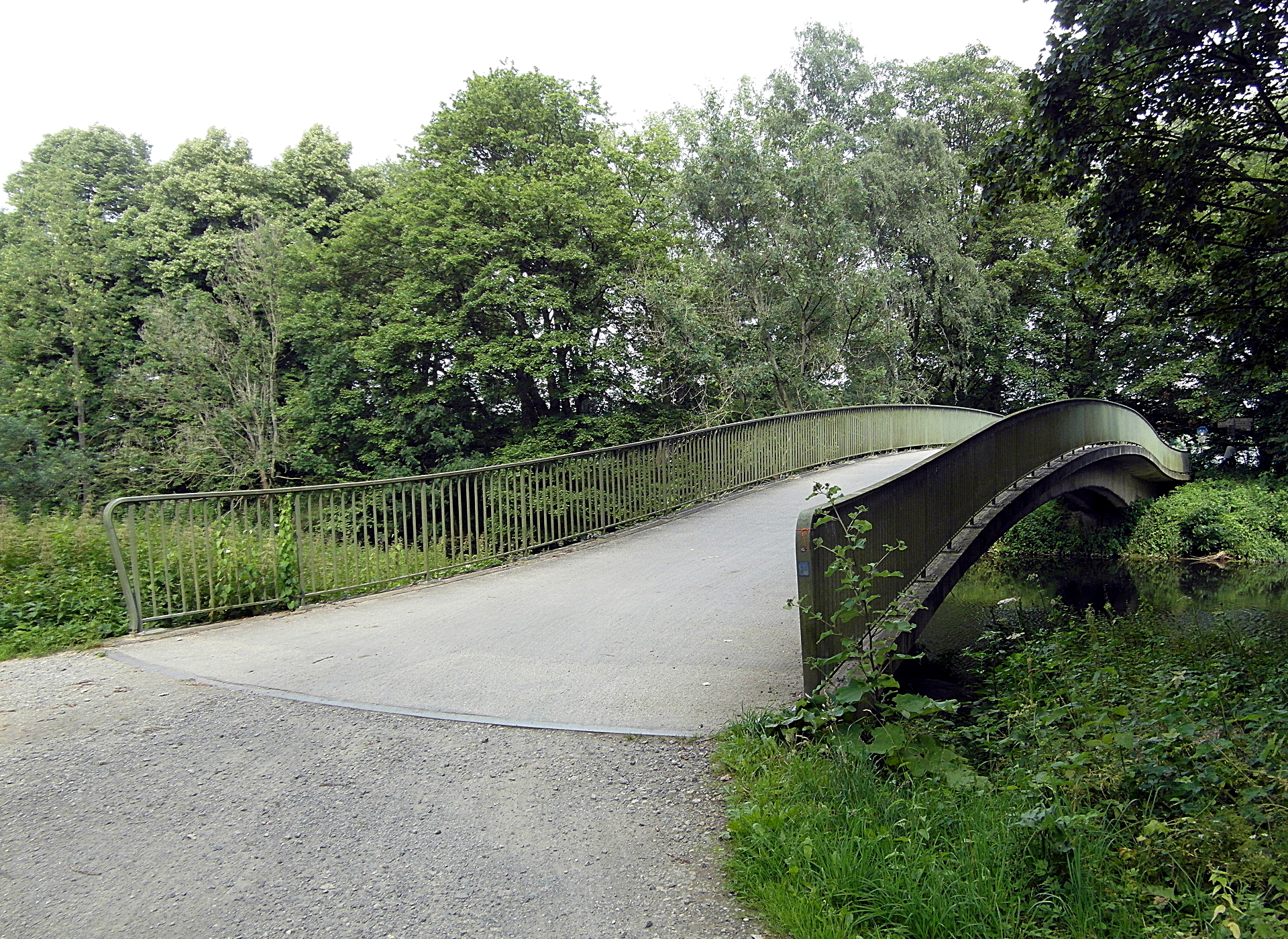 Die Schwienbrücke ist eine 1963 errichtete Spannbetonbrücke. Sie überquert die Leine von Hannovers Stadtteil Ricklingen zum Stadtteil Südstadt.